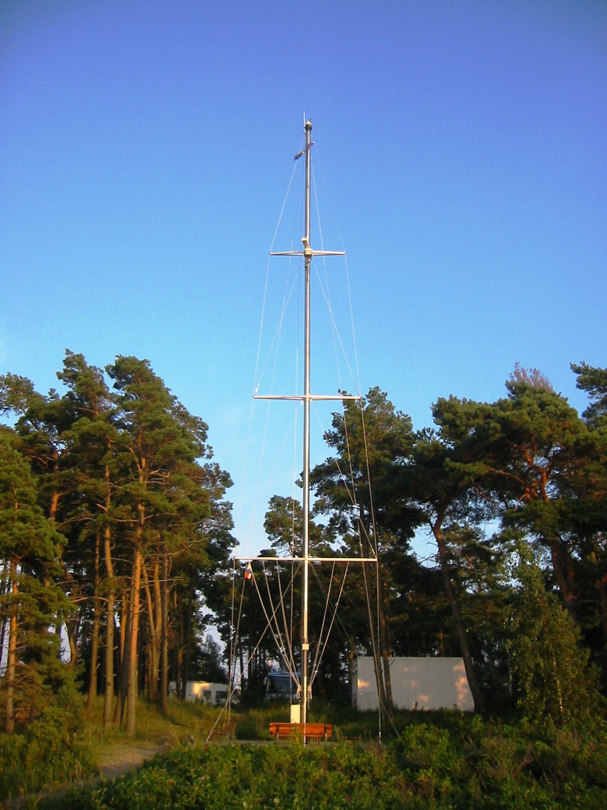 27 m hoher Flaggenmast in der Marina Lubmin in Lubmin, einer Gemeinde im Landkreis Ostvorpommern. Der Mast enthält neben UKW-Seefunk, Radar, AIS, WLAN auch über eine Webcam sowie eine Flugsicherungseinrichtung und eine Windmessanlage.